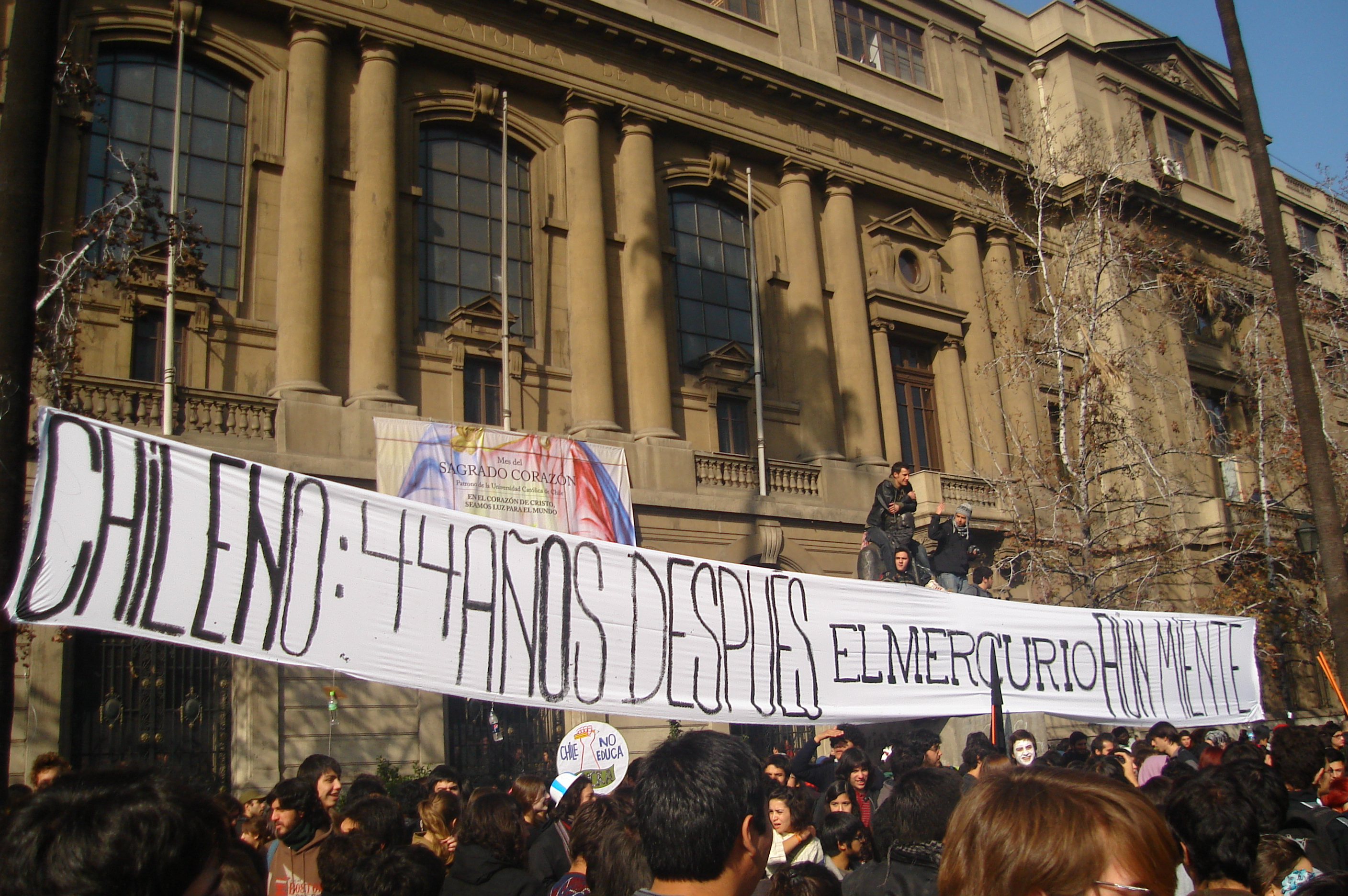 Cartel durante la marcha estudiantil del 16 de junio de 2011, frente a la Casa Central de la Universidad Católica de Chile. La leyenda dice: Chileno, 44 años después, El Mercurio aún miente.